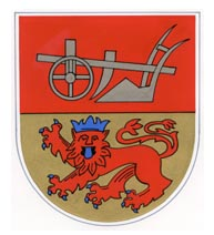 Wappen von Hungenroth